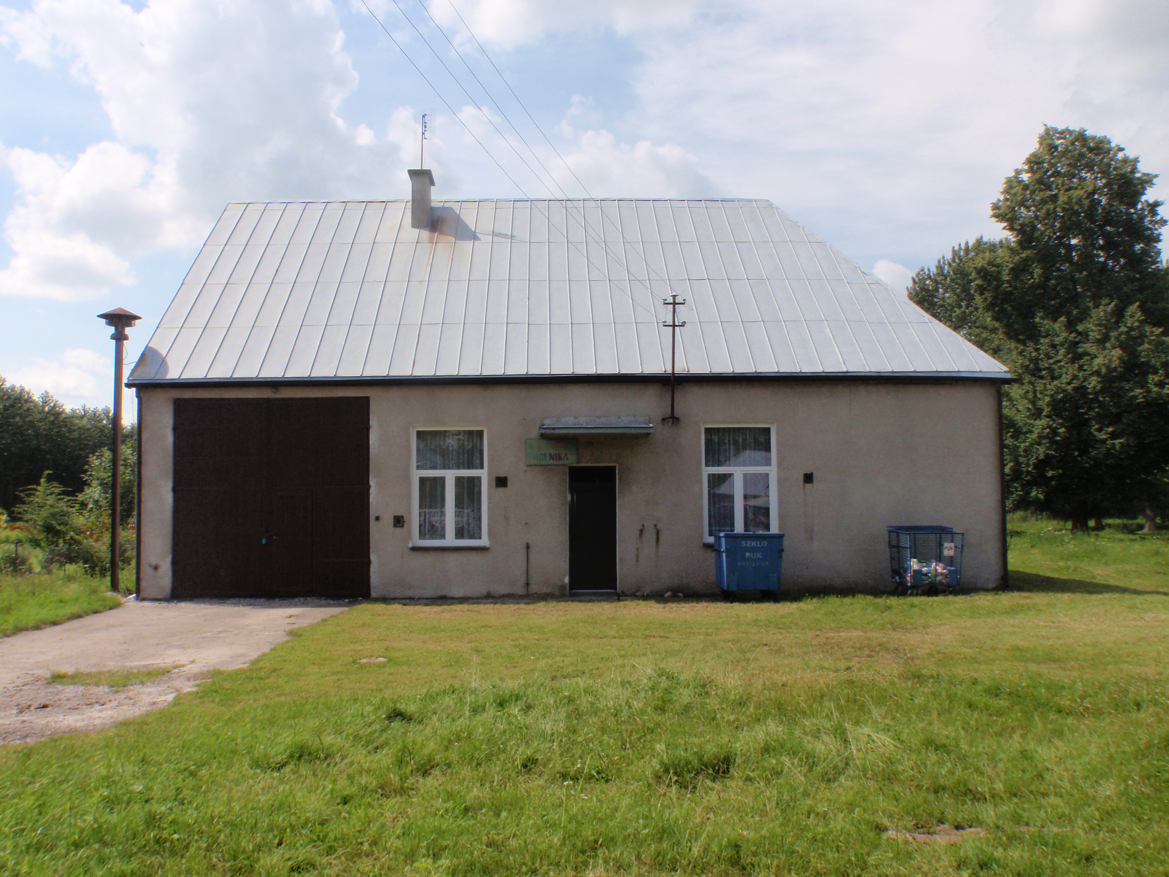 Czyżyki - Klub Rolnika Gminnej Spóldzielni "Samopomoc Chłopska"